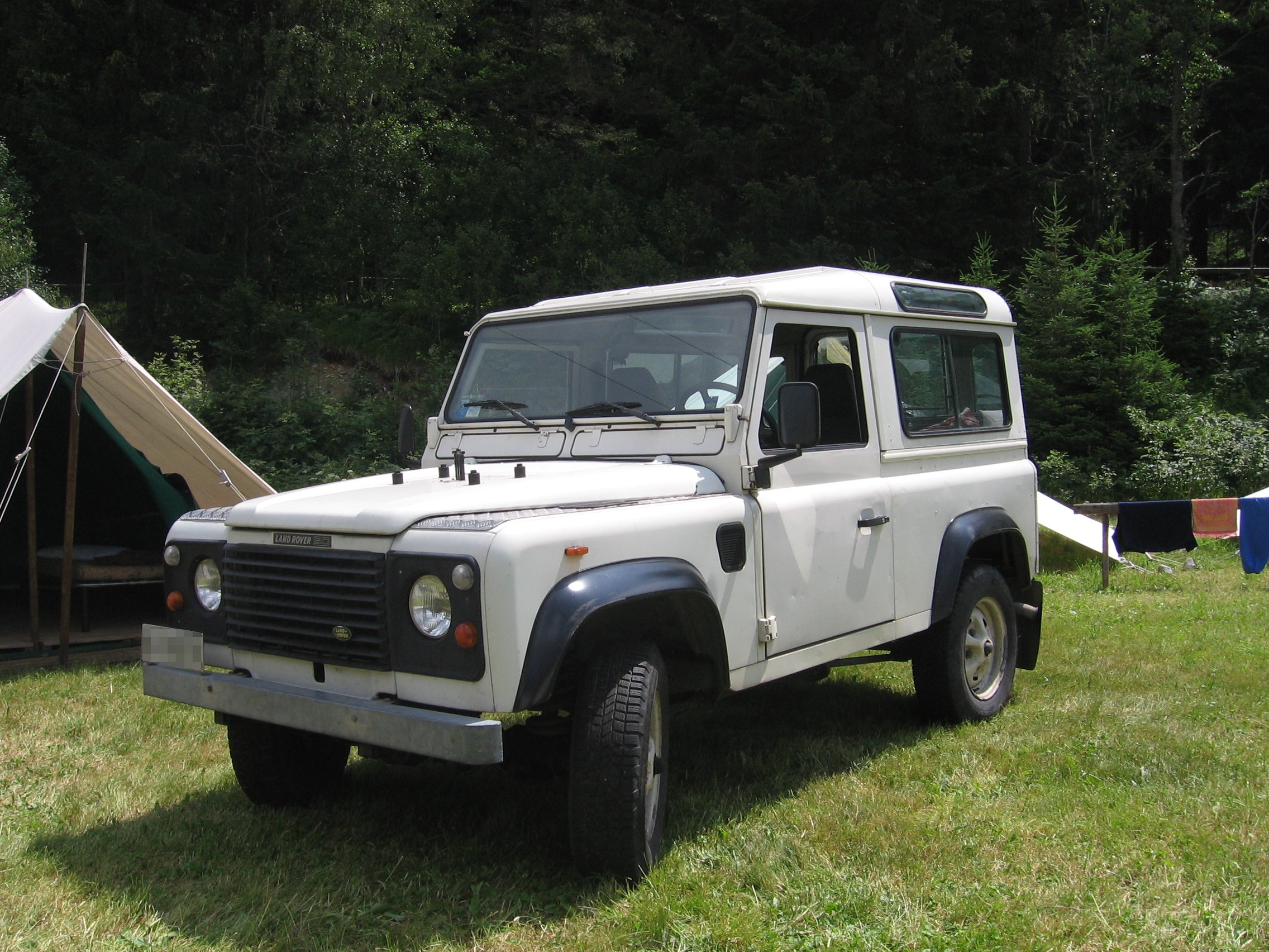 Land Rover 90